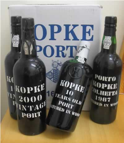 e